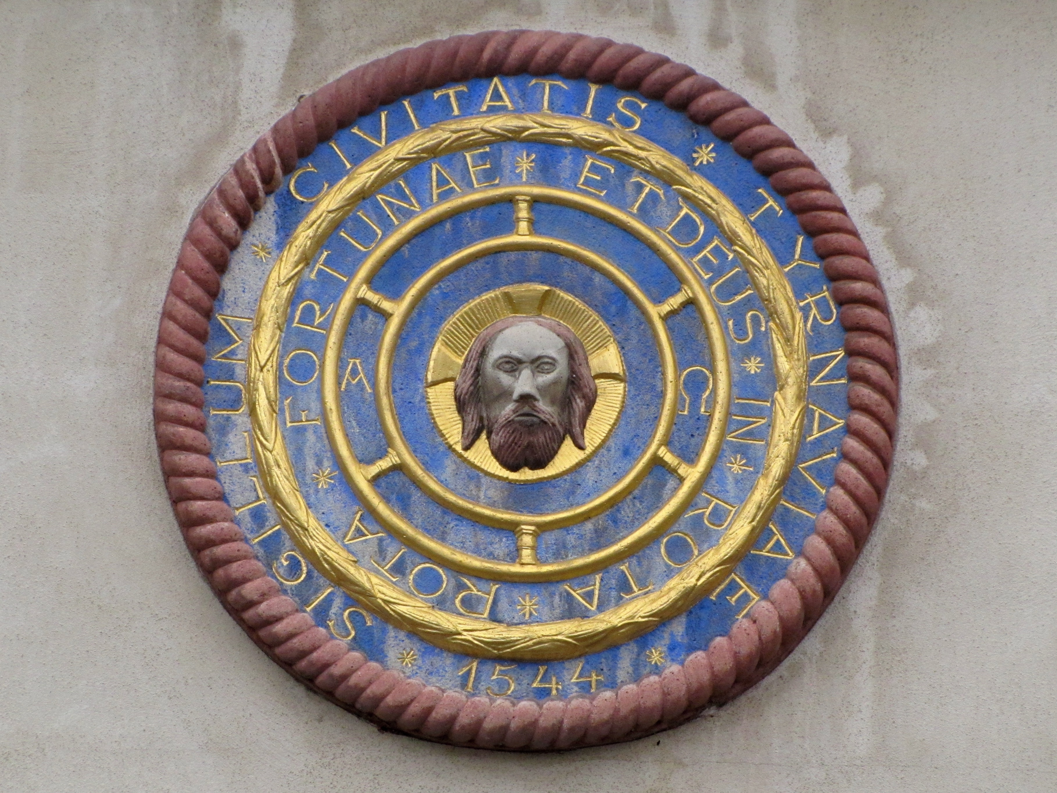 Městský znak nad vstupem do městské věže v Trnavě